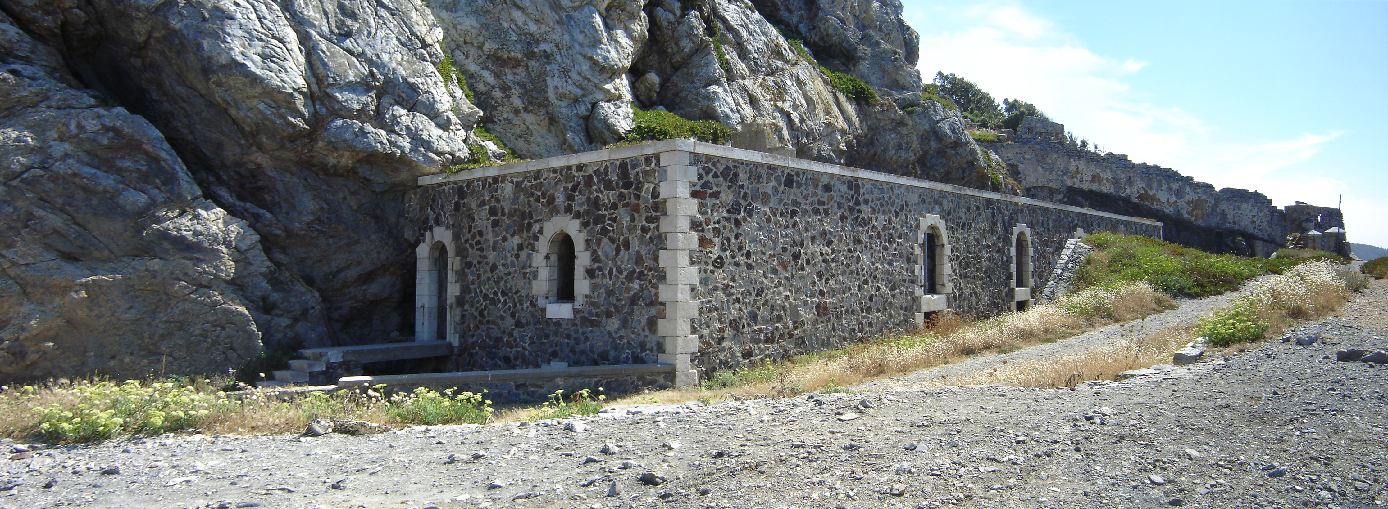 Panorama de la batterie des Mèdes à Porquerolles.